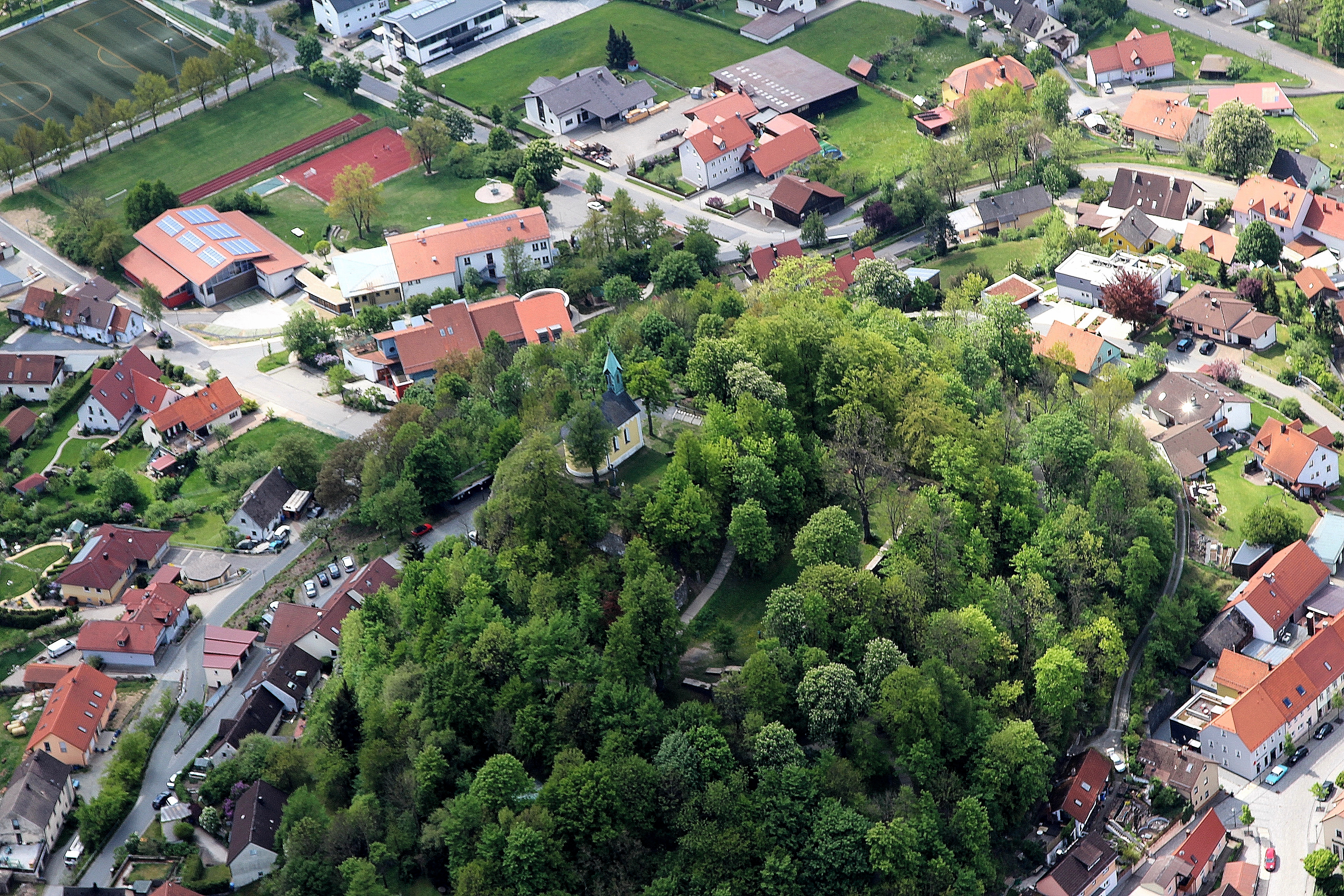 Parkstein, Landkreis Neustadt an der Waldnaab, Oberpfalz, Bayern